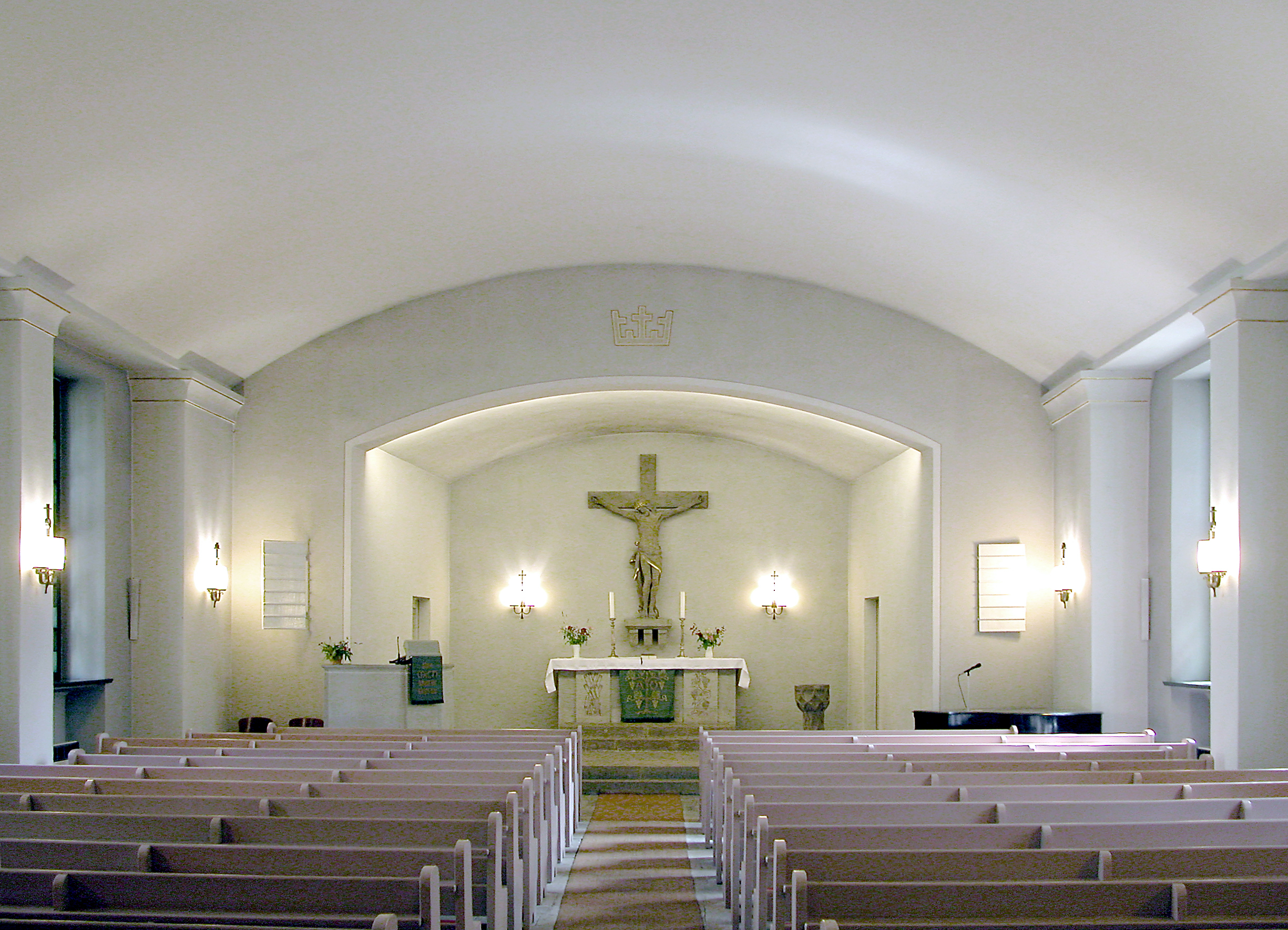 26.07.2010 01277 Dresden-Seidnitz, Altseidnitz 12 (GMP: 51.027147,13.803307): Ev.-Luth. Nazarethkirche. 1915 erbaut nach nach Plänen des Architekten Dr. Rauda unter Leitung von Architekt Burckhardt auf dem Gelände des vormals Goschmannschen Gutes. Die schwer kriegsbeschädigte Scheune wurde zur Kirche umgebaut. Das Kruzifix gehörte zum Altar der im Krieg zerstörten und nach dem Krieg abgerissenen "Ehrlichschen Gestiftskirche" (Blochmannstraße / Grunaer Straße). [DSCN42501.TIF]2100726070DR.JPG(c)Blobelt